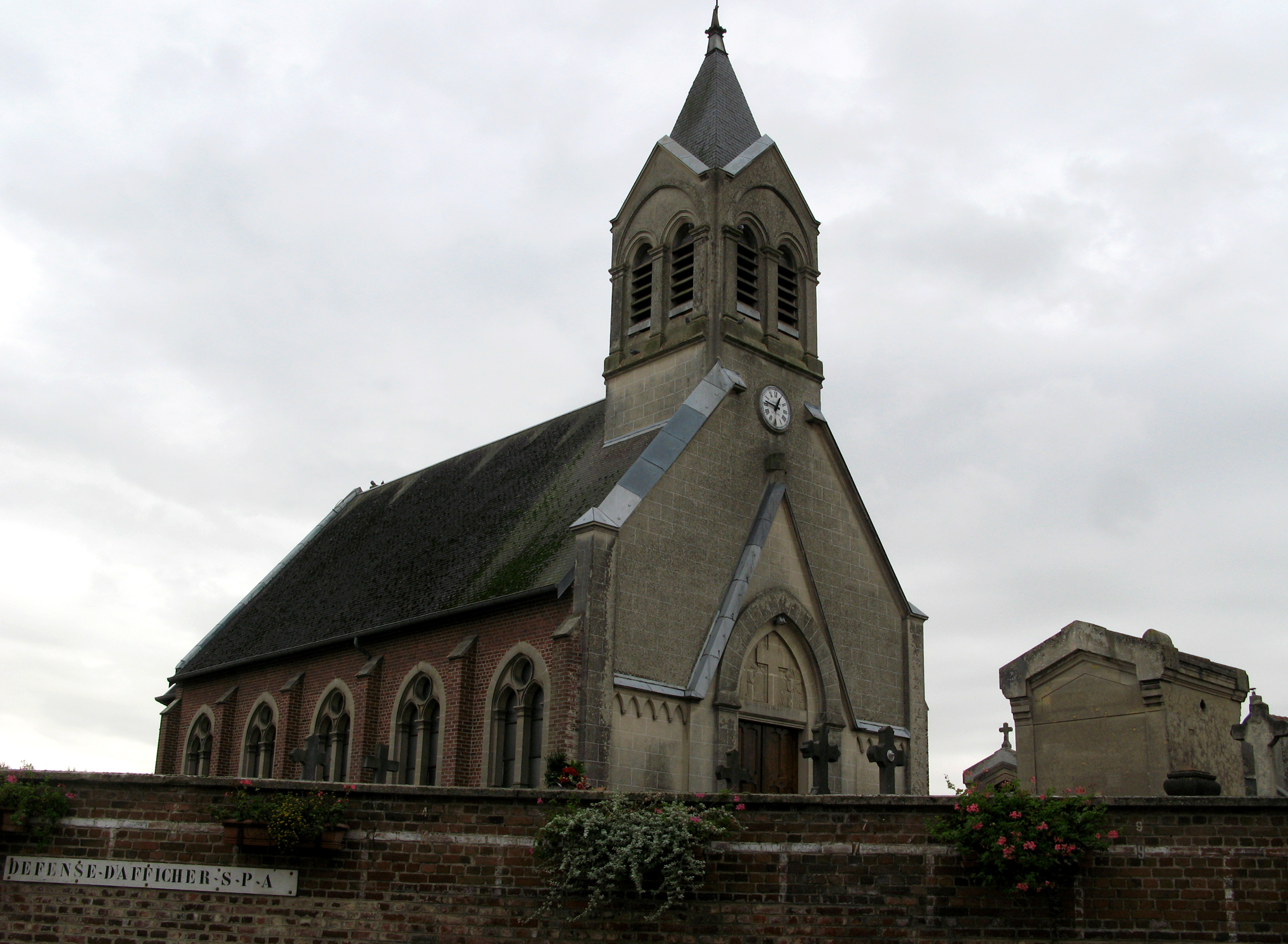 Omissy (Aisne, France) - L'église. . .